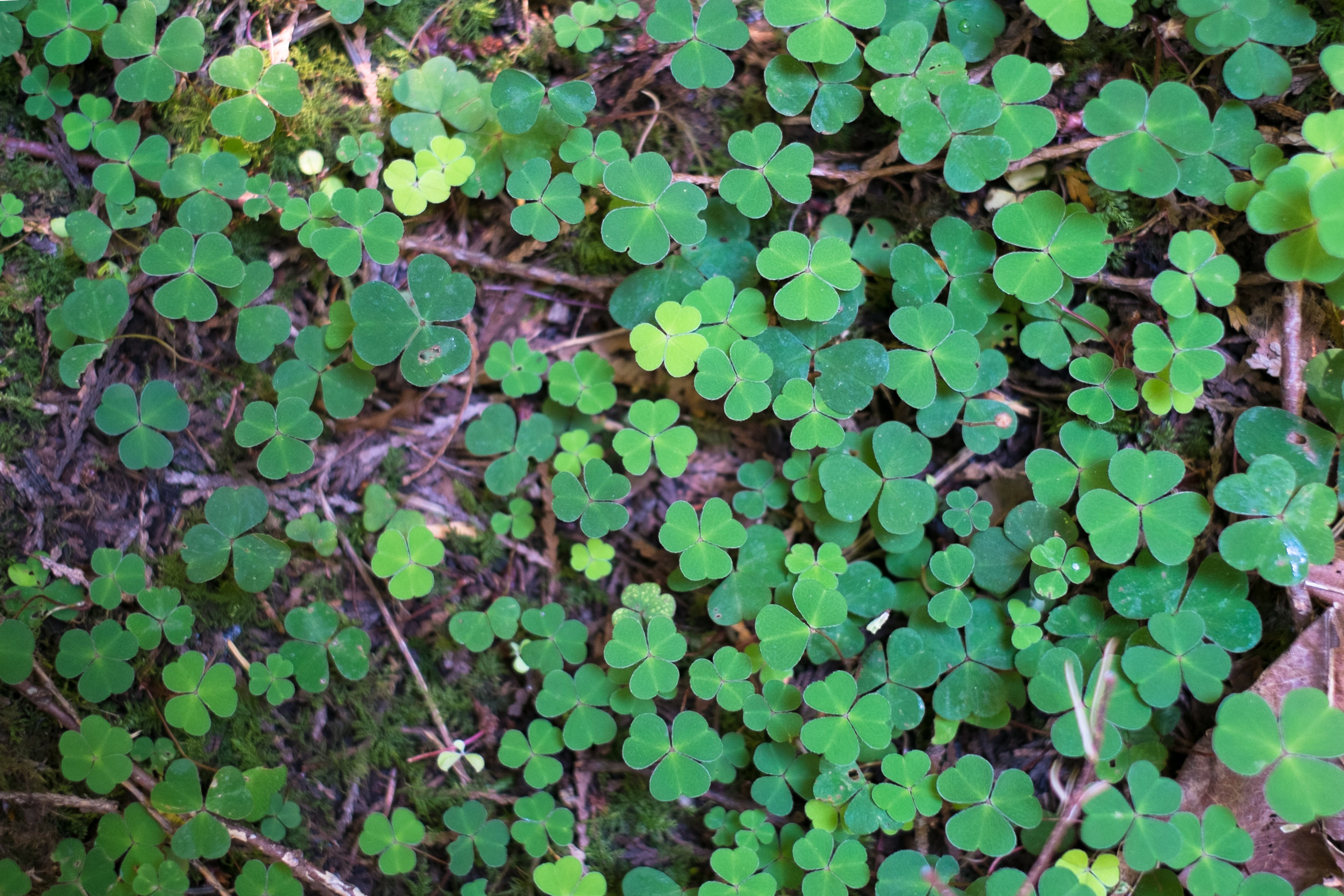 Clover at Milner Gardens and Woodland